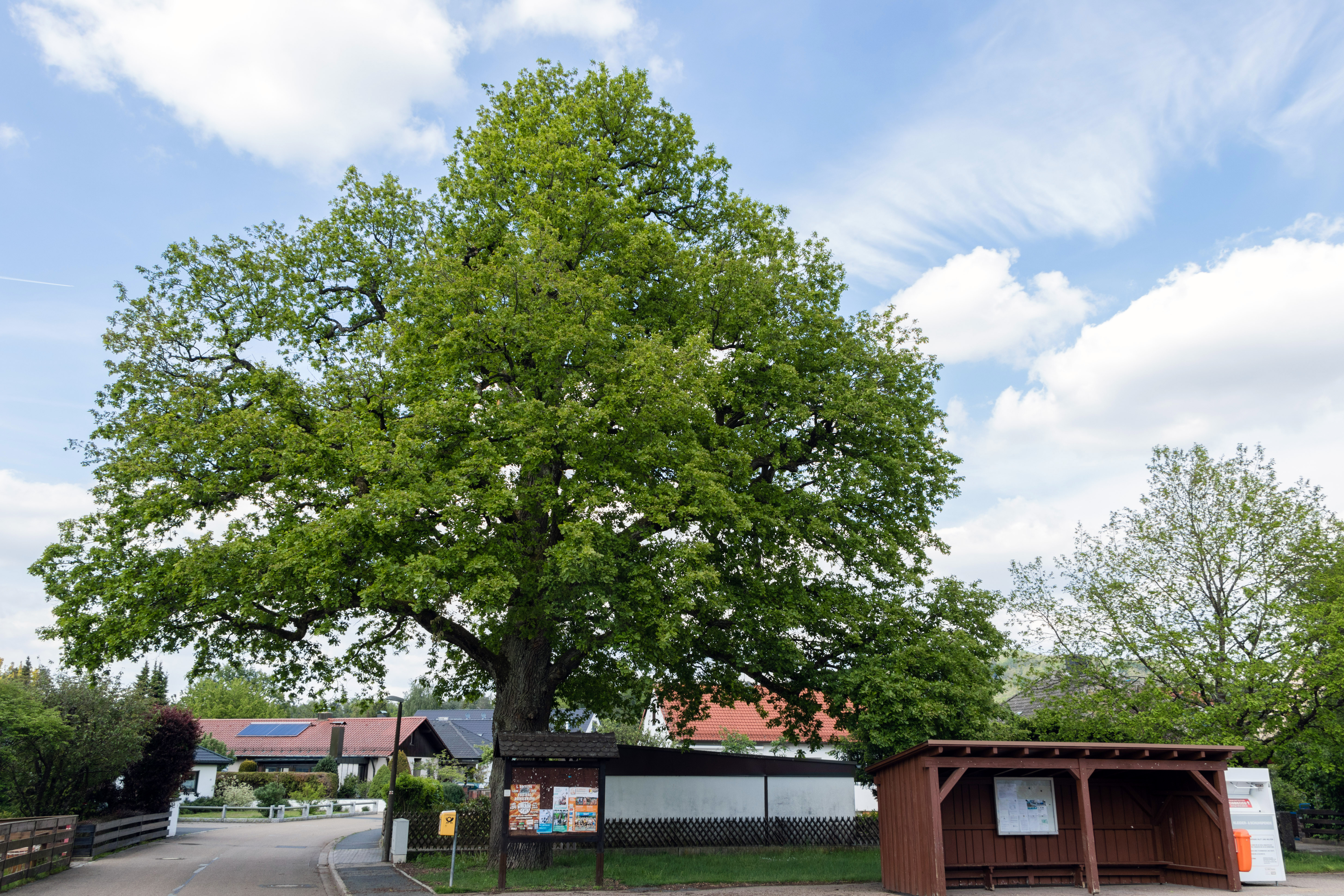 Röthenbacher Angereichen, Aldorf bei Nürnberg, Röthenbach, Naturdenkmal